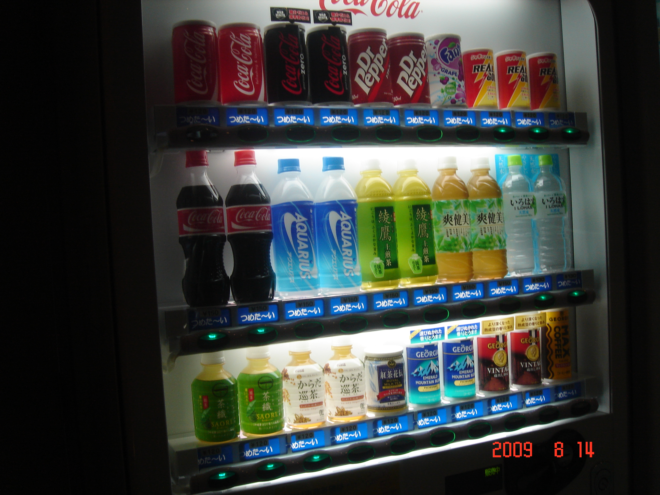 渋谷の電力館にあるコカ･コーラ自動販売機 Sony Cyber-shot DSC-T7